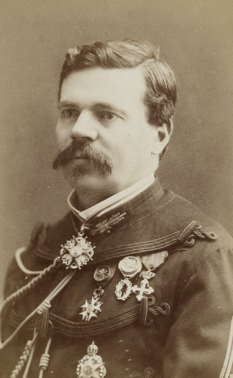 François Perrier (général)